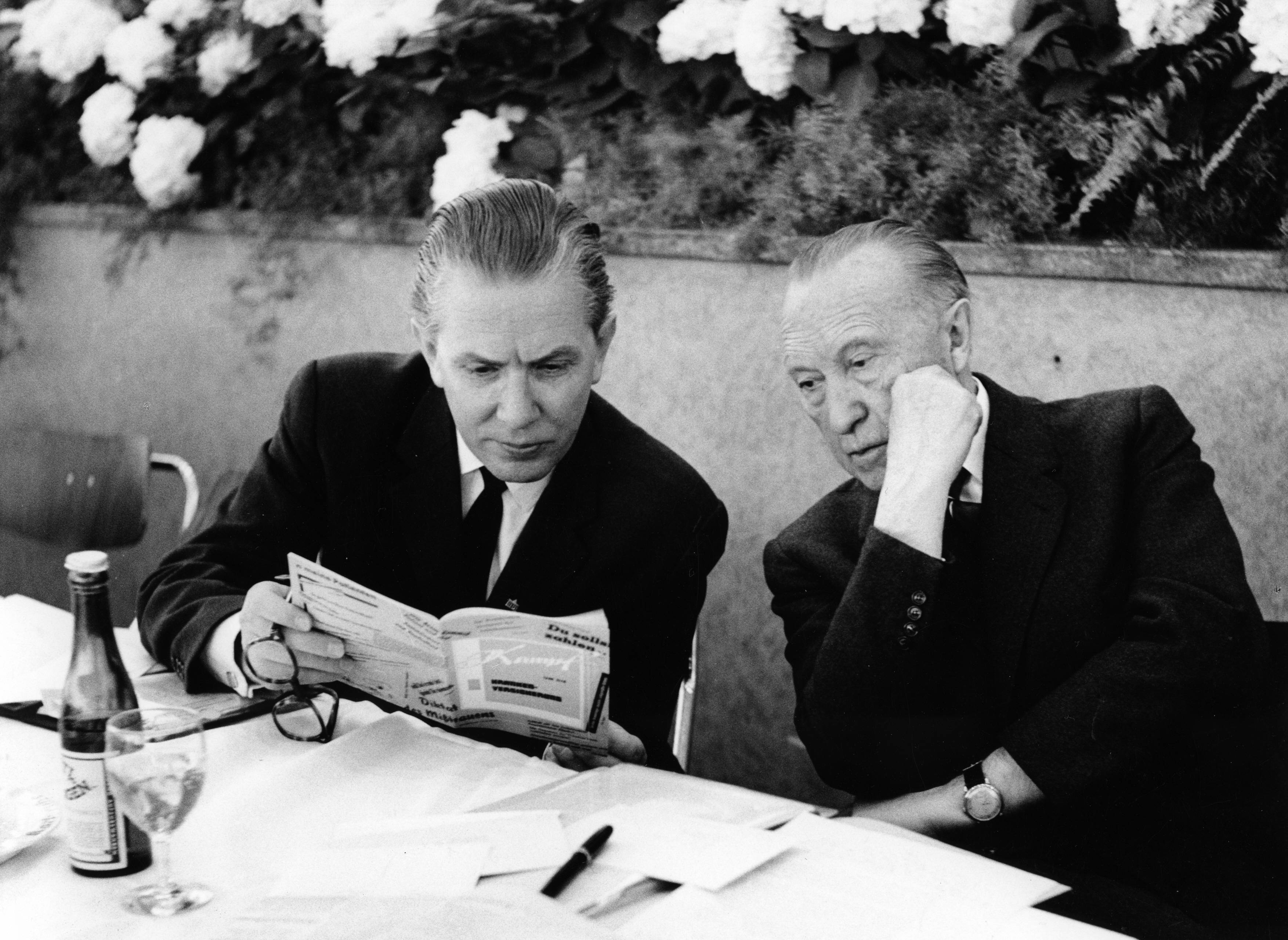 Adenauer, Konrad9. CDU-Bundesparteitag, 26.04.1960 - 29.04.1960